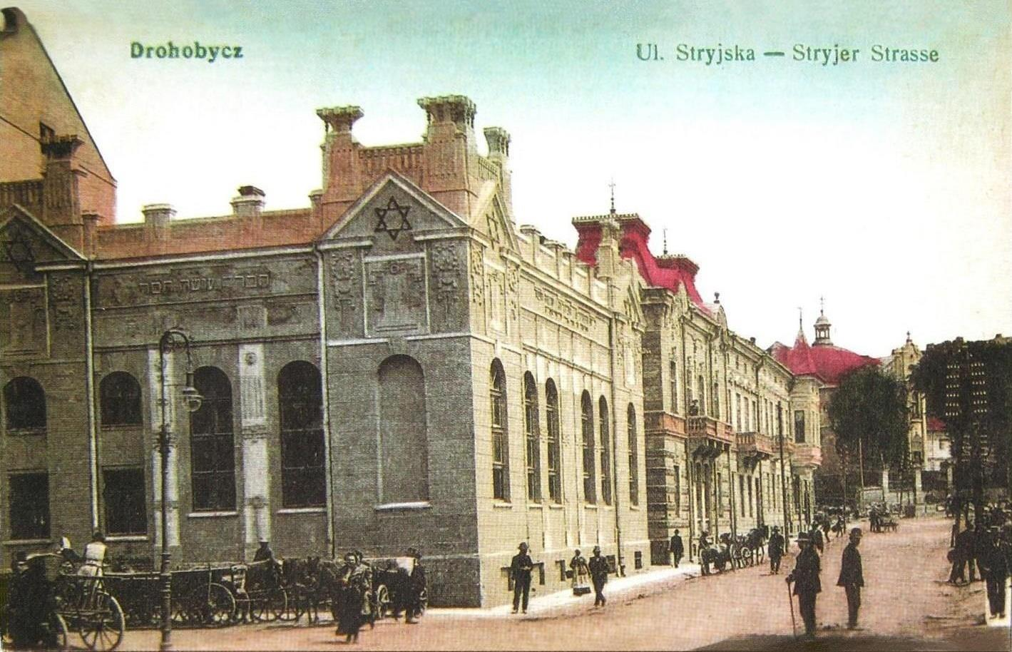 Реформисткая синагога Осе Хесед в Дрогобыче.